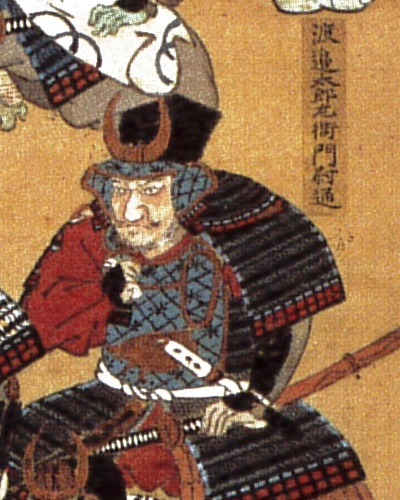 戦国時代の武将・渡辺通の画像（毛利博物館蔵「毛利元就座備図」より抜粋）